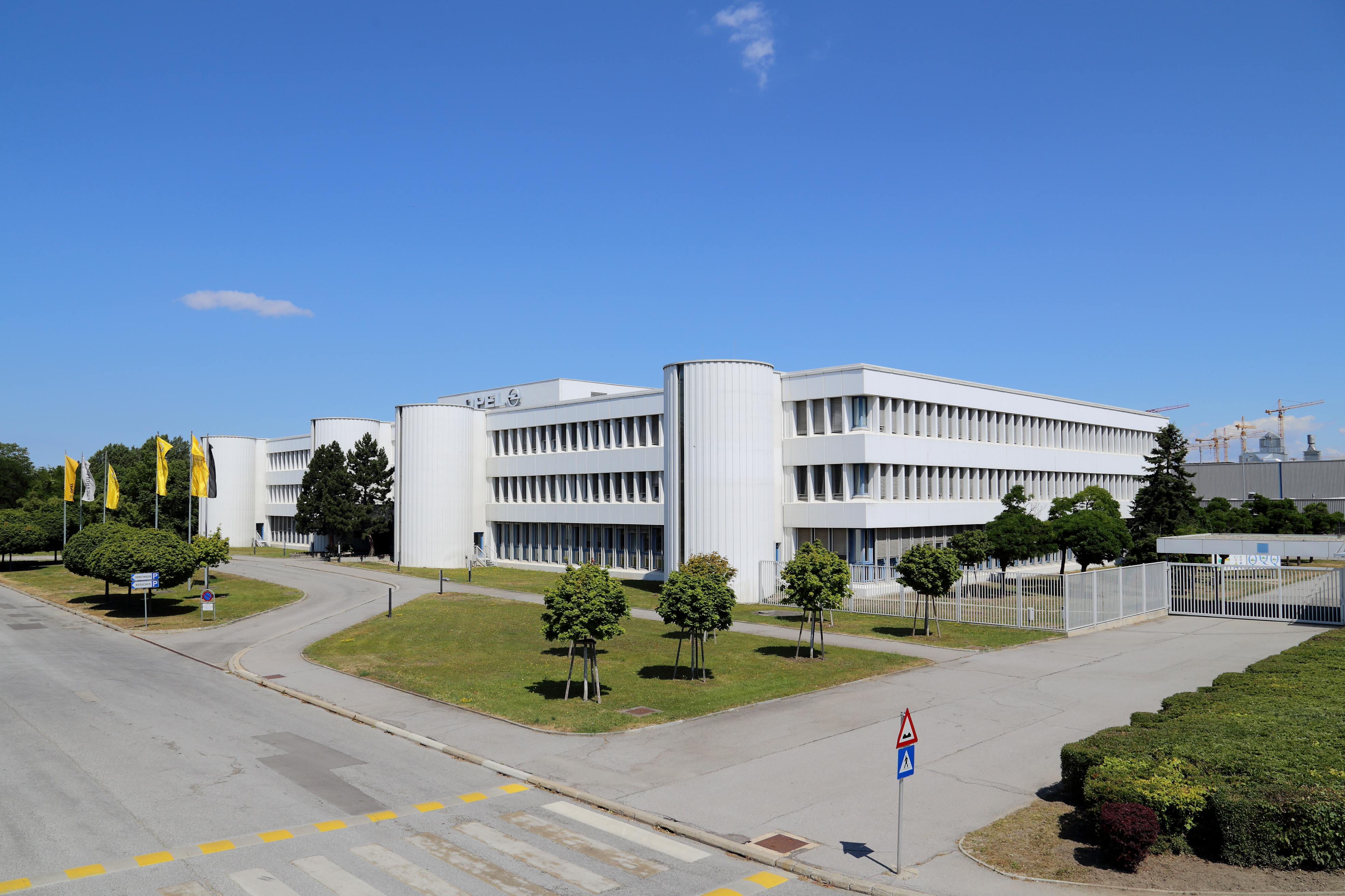 Das südseitig der Produktionshalle situierte Verwaltungsgebäude des Opelwerkes in Aspern, ein Ortsteil der Bundeshauptstadt Wien.